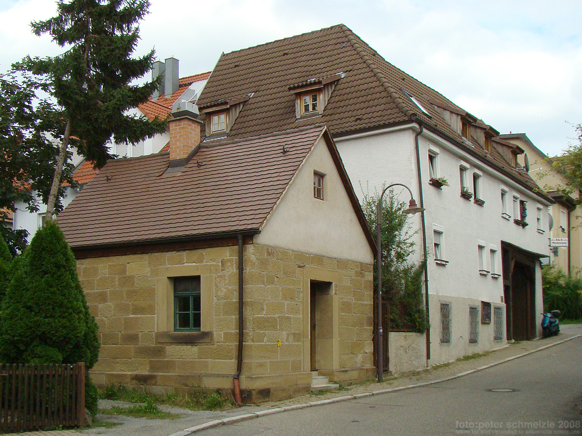 Altes Backhaus in der Bundschuhstraße 6 in Heilbronn-Sontheim